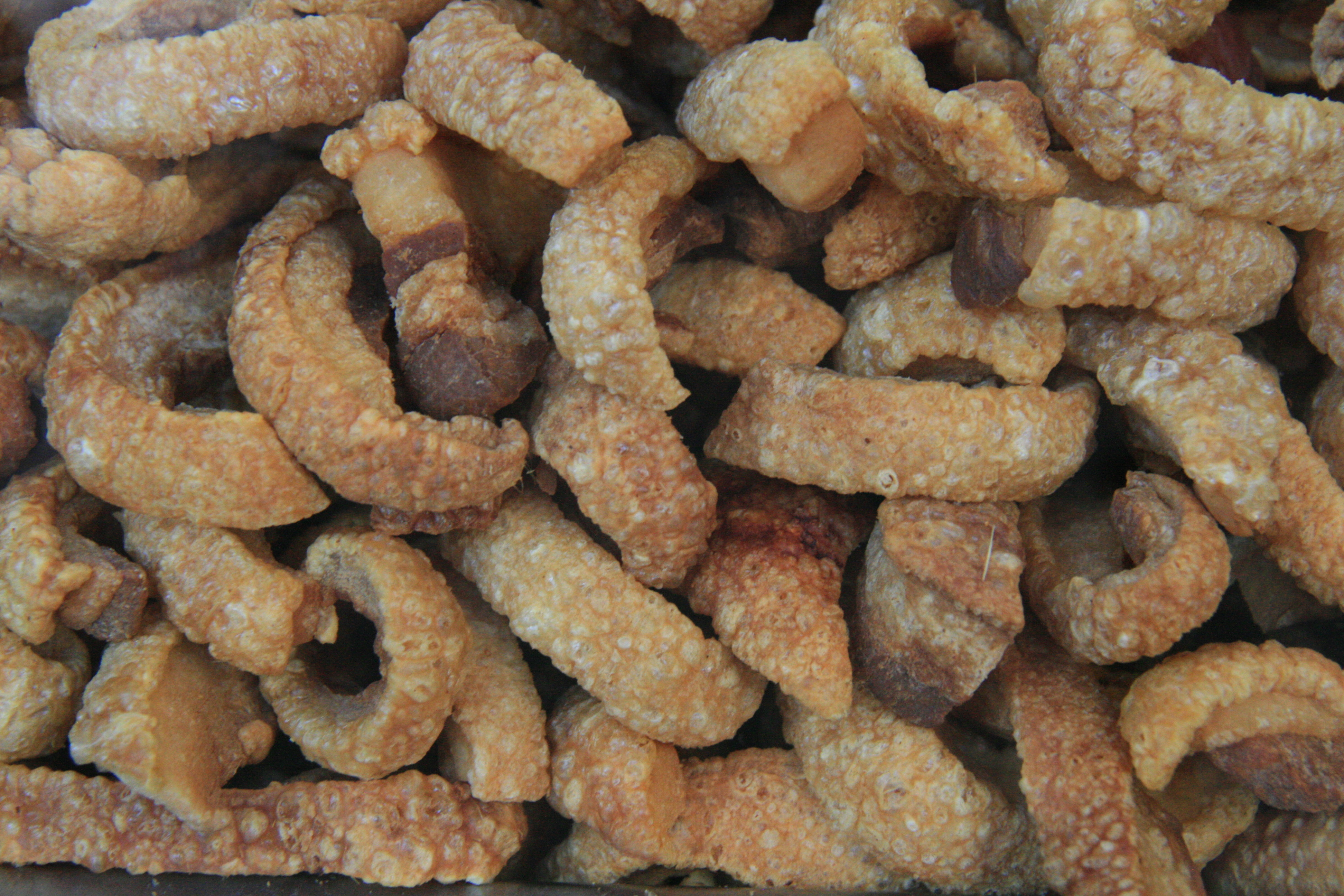 Torreznos - Cerca